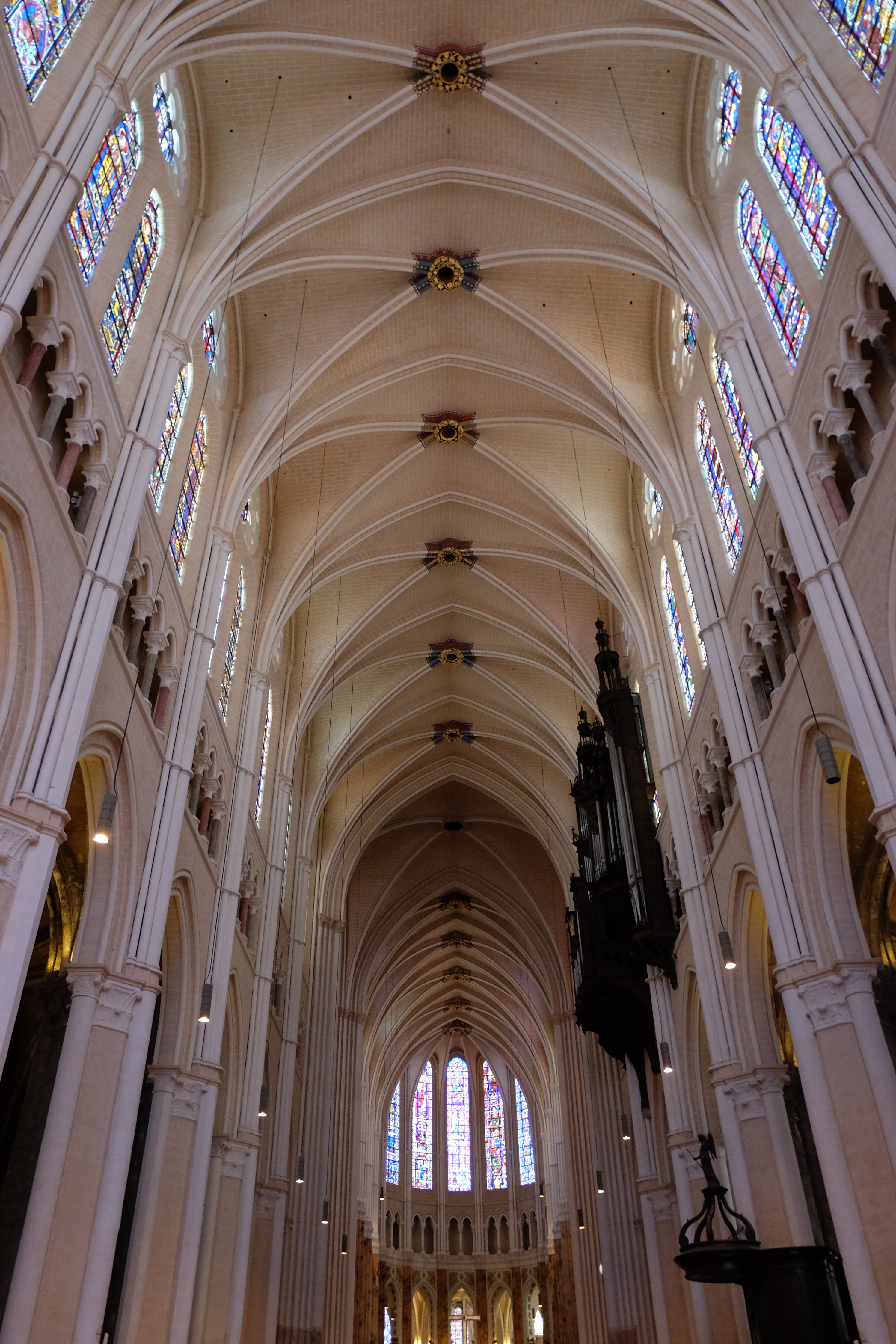 Cathédrale Notre-Dame